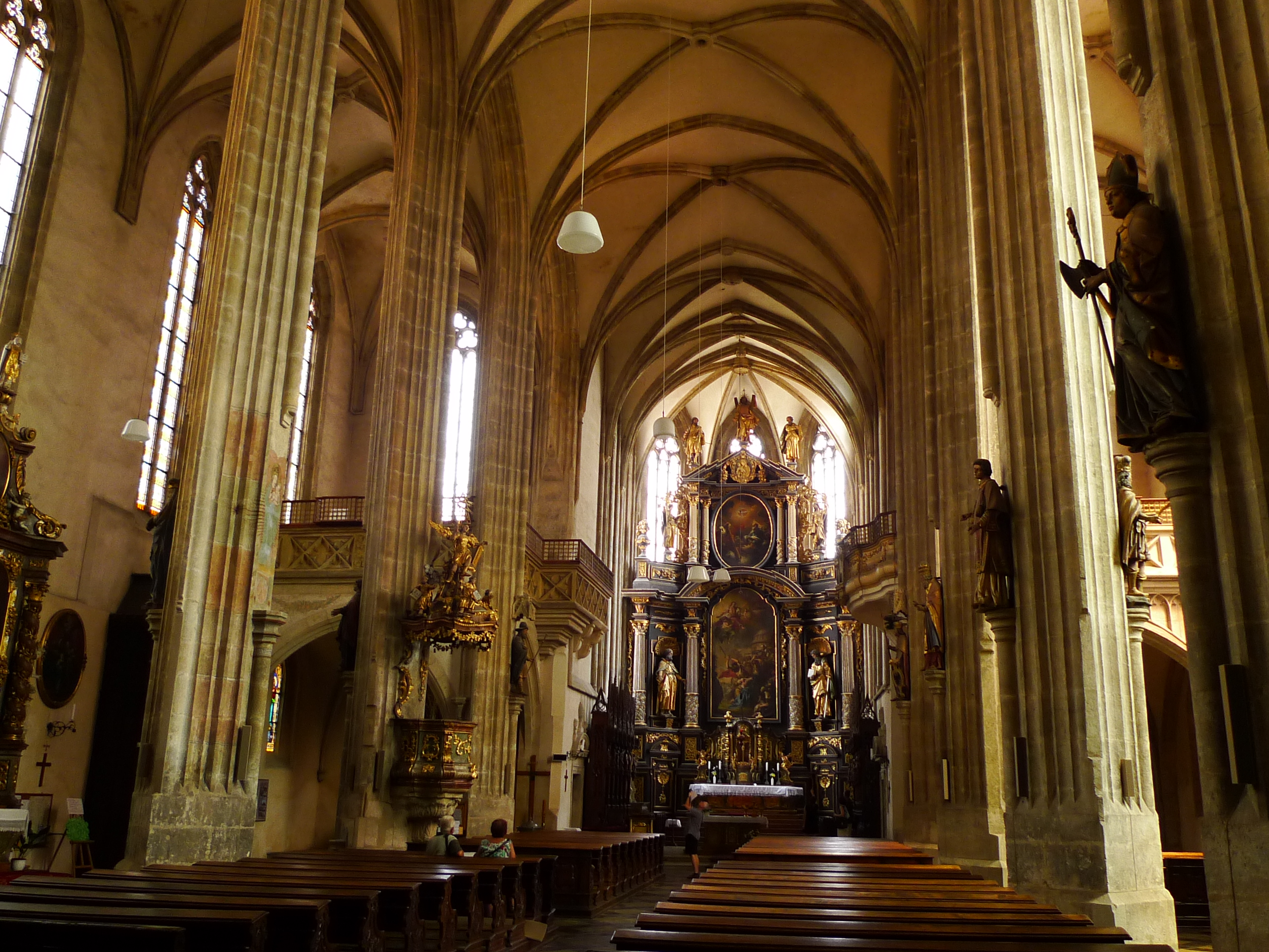 Kostel sv. Jakuba (Kutná Hora), u Vlašského dvora, Kutná Hora